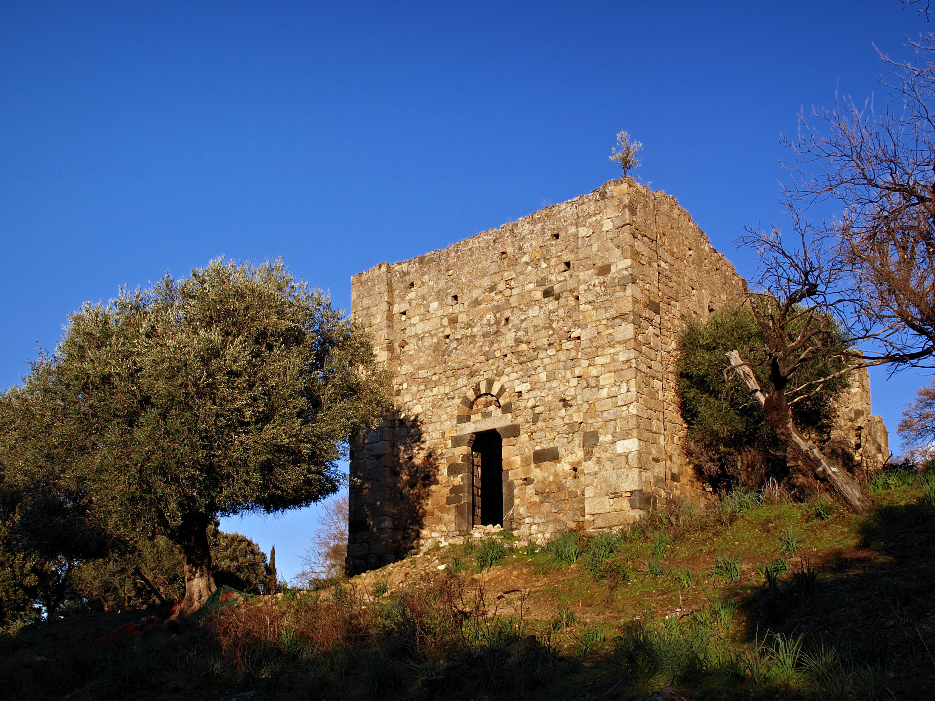 Ville-di-Paraso, Balagne (Haute-Corse) - Ruines de l'ancienne Pieve Saint-Jean (San Ghjuvanni) à Tuani